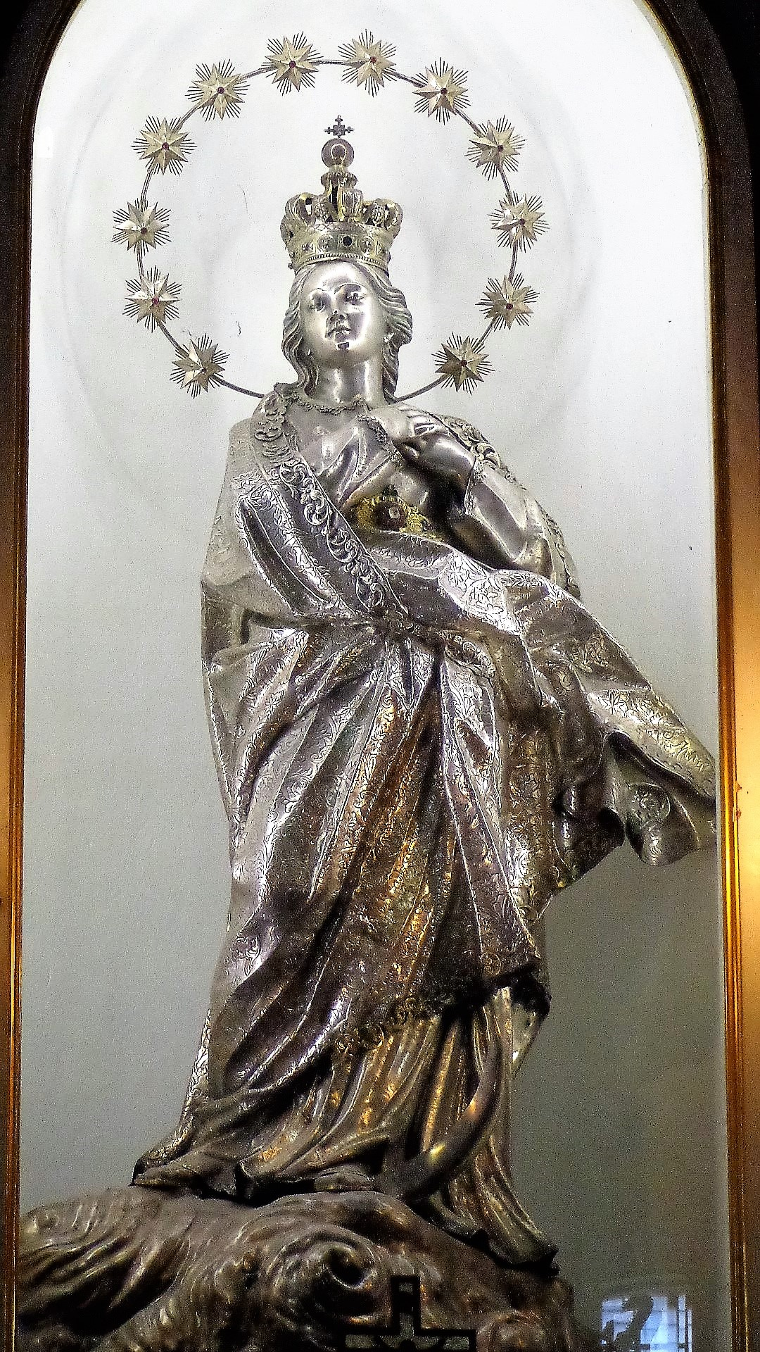 Statua argentea Immacolata Concezione